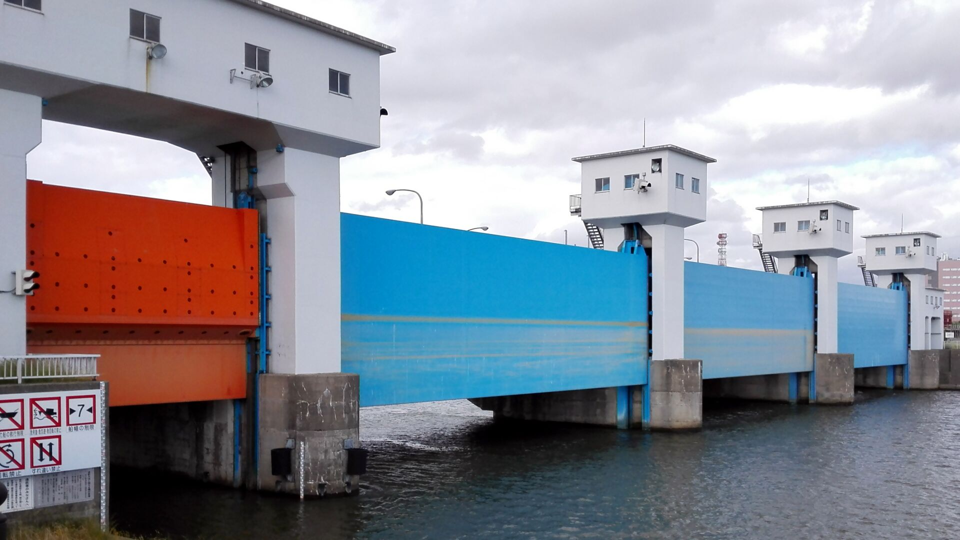 上流側から撮影